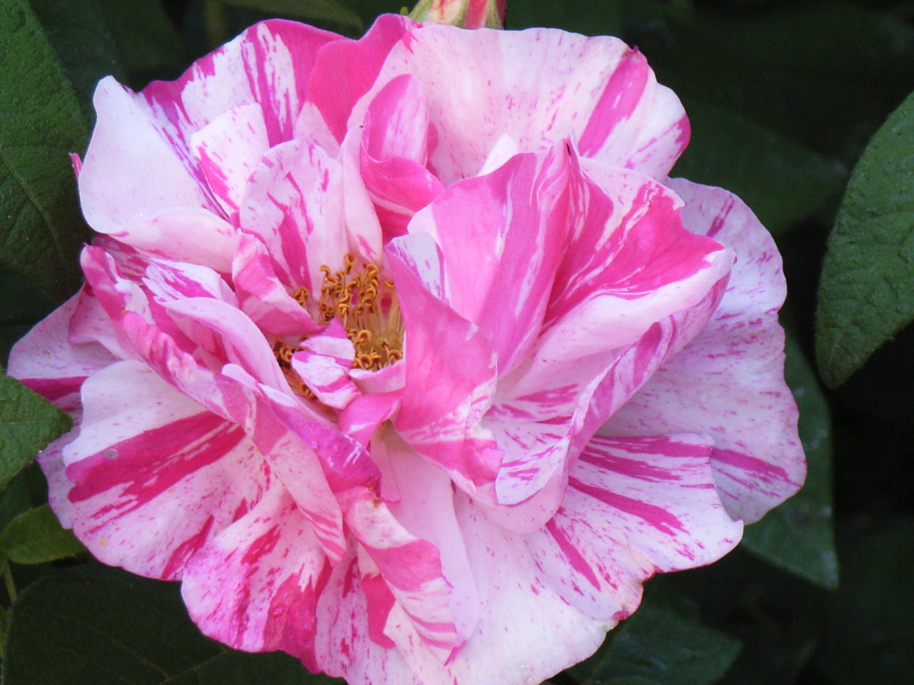 Rose, cultivar 'Rosa Mundi'